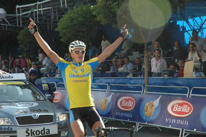 Eigen foto